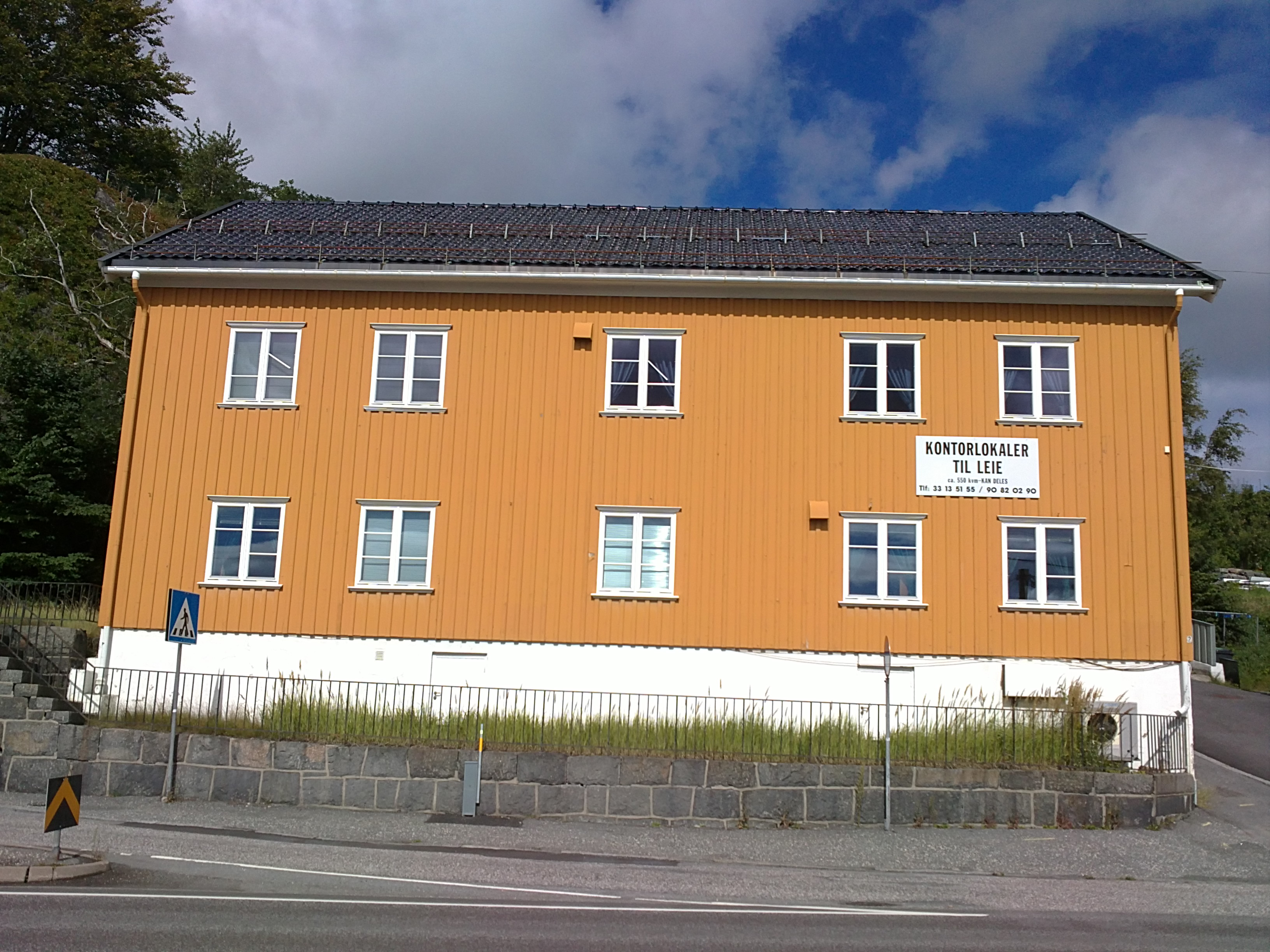 Bilde av Storgata 52, Larvik, tidligere "Slutteriet"